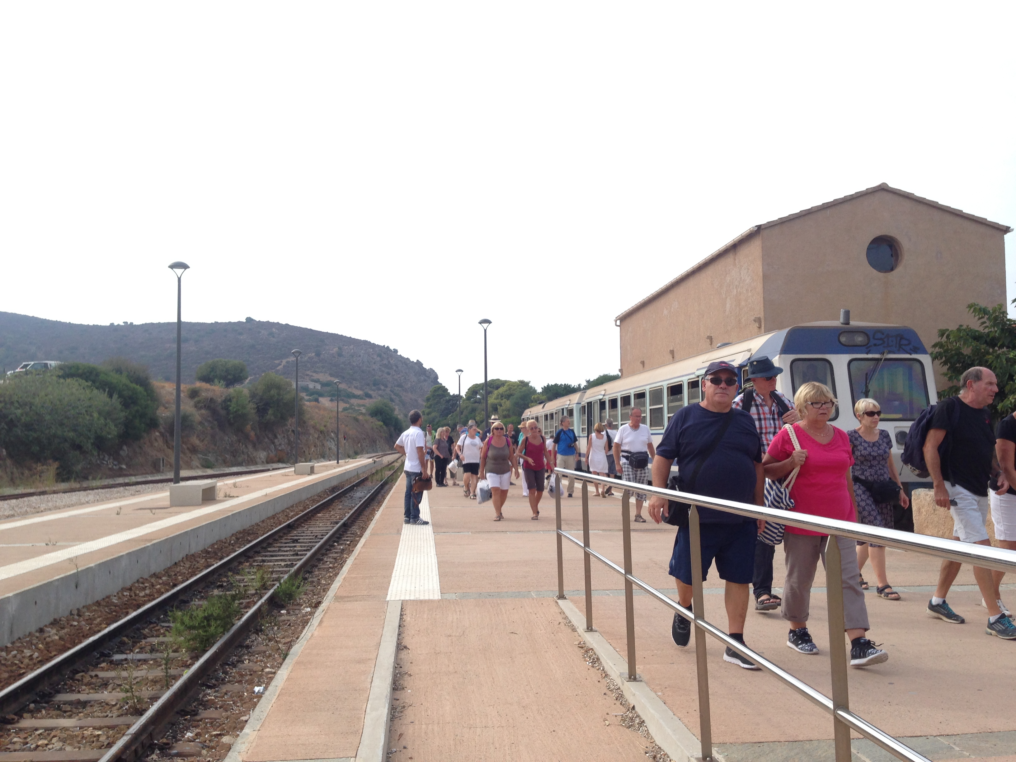 Gare de L'Île-Rousse-2016